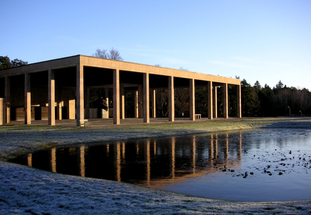 Monumenthallen på Skogskyrkogården i Stockholm